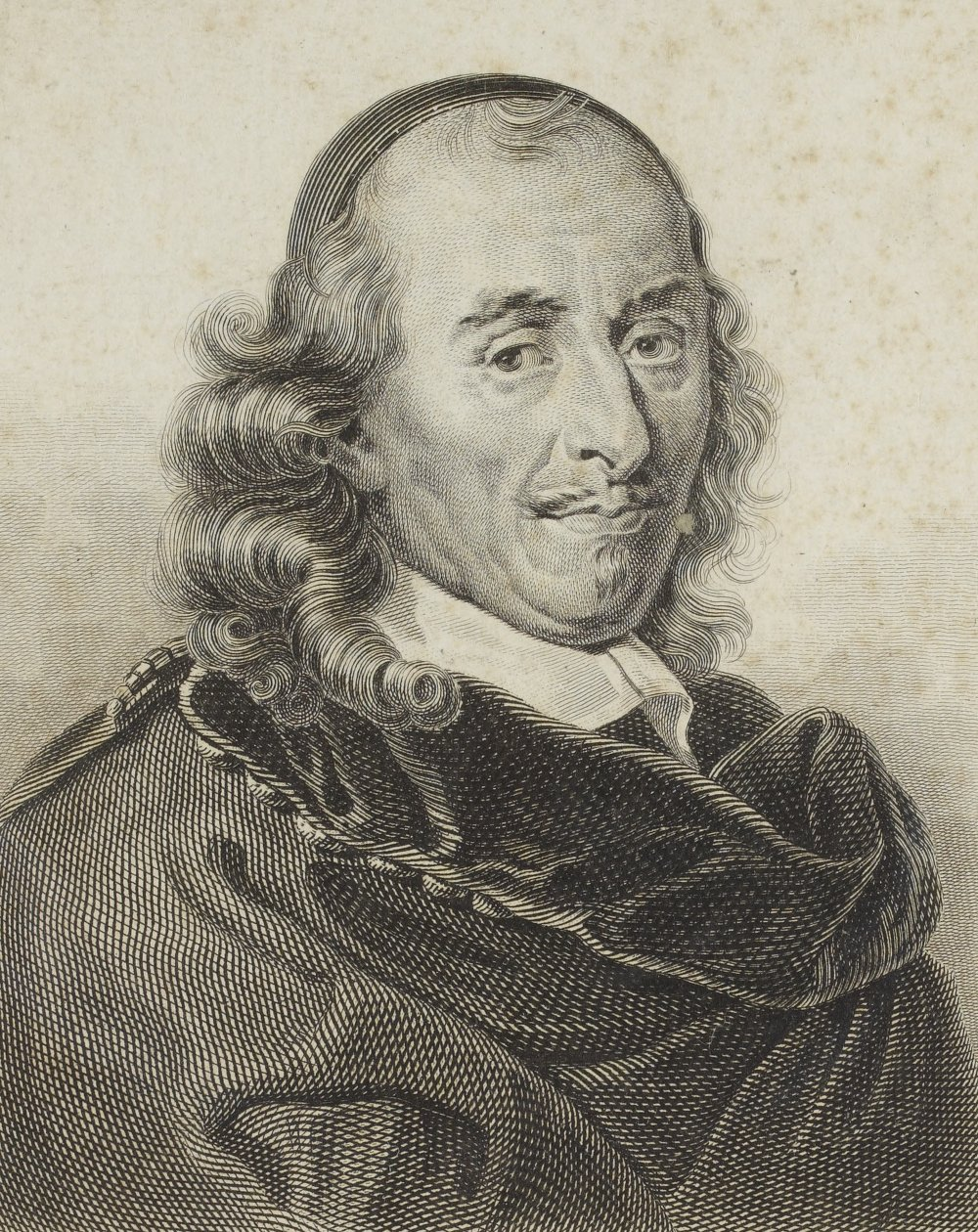 Gravure représentant Pierre Corneille